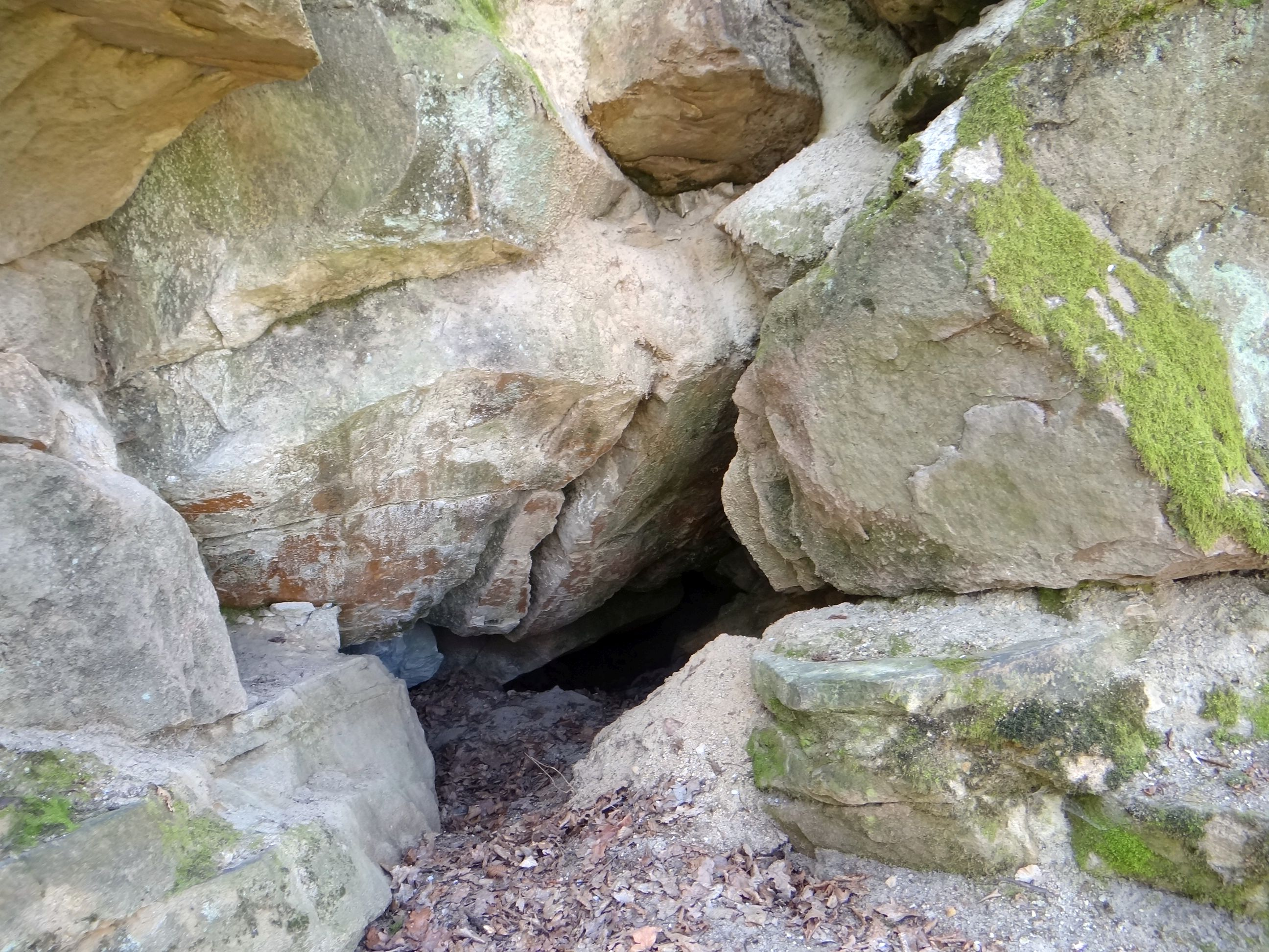 Jaskinia w Ciężkowicach I